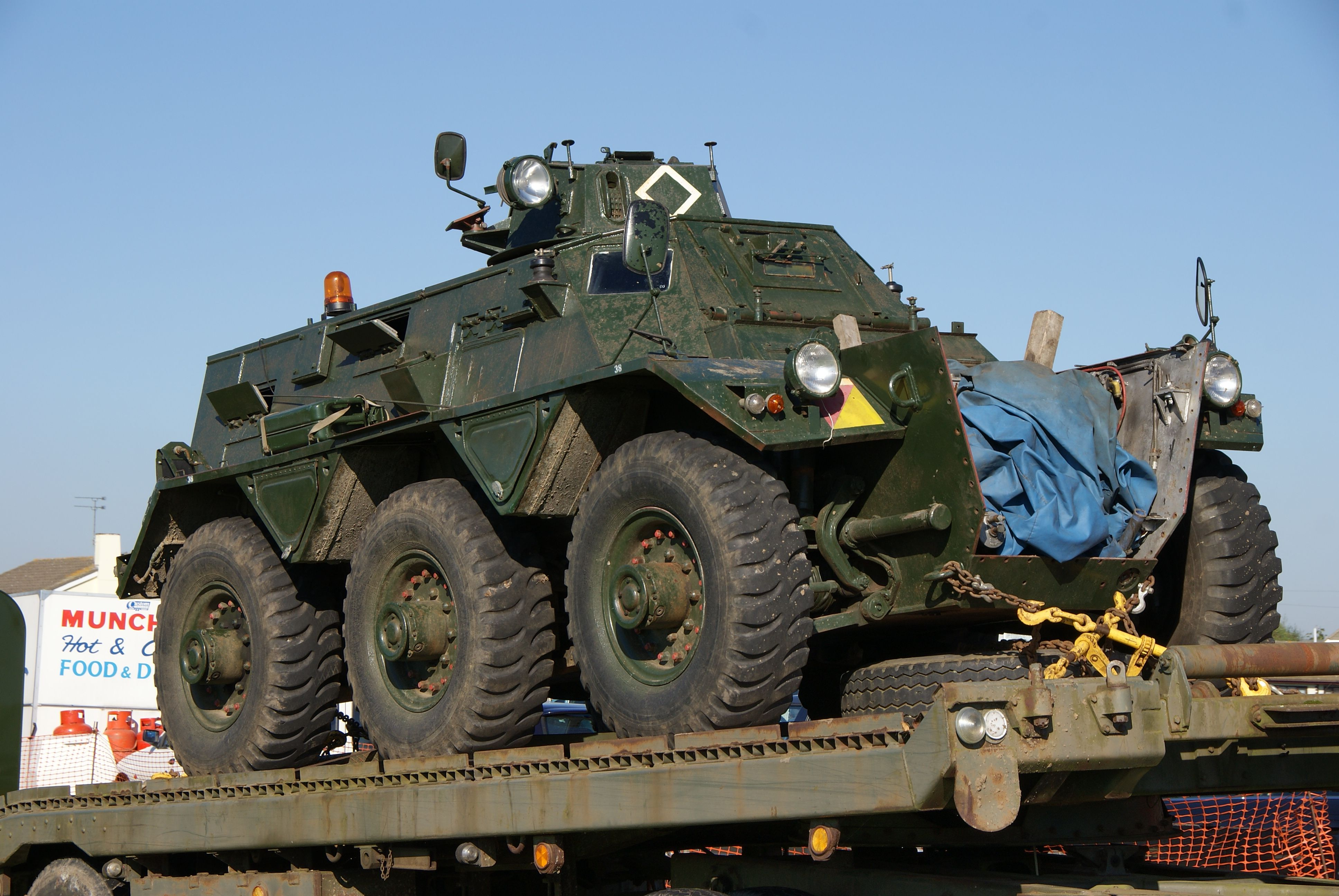 EXP290K-05FF84-1 101010 CPS